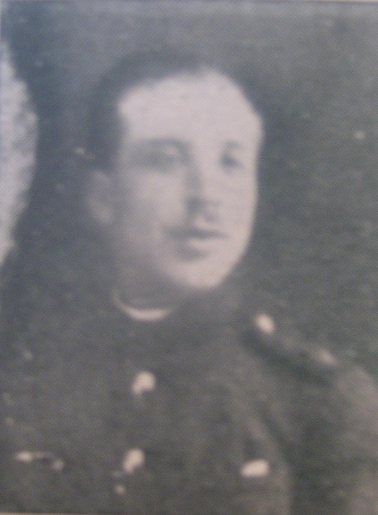 Петър Карамитрев, участник в Кресненско-Разложкото въстание.